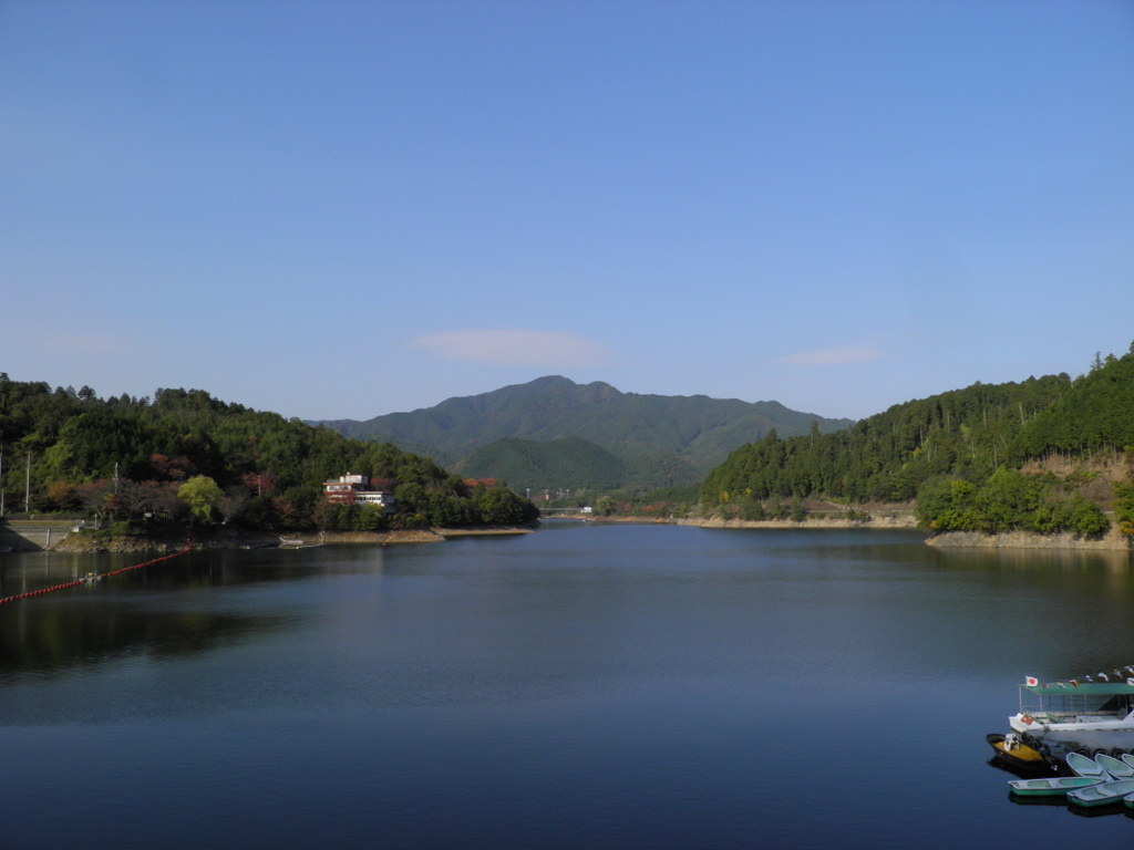 津風呂ダム（奈良県吉野郡吉野町）